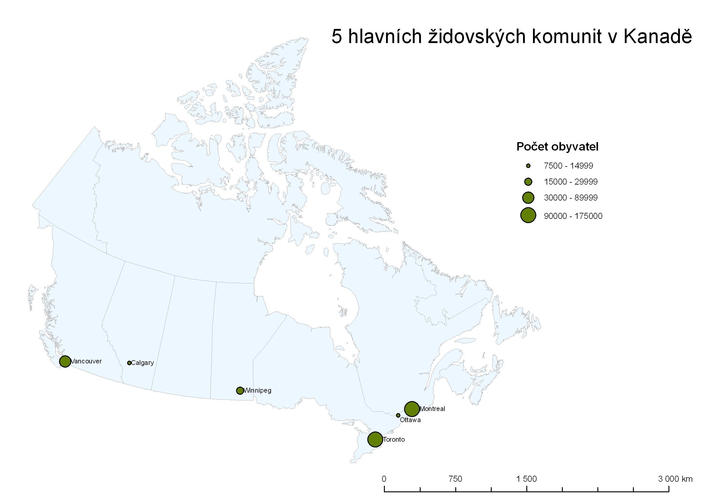 5 hlavních židovských komunit v Kanadě